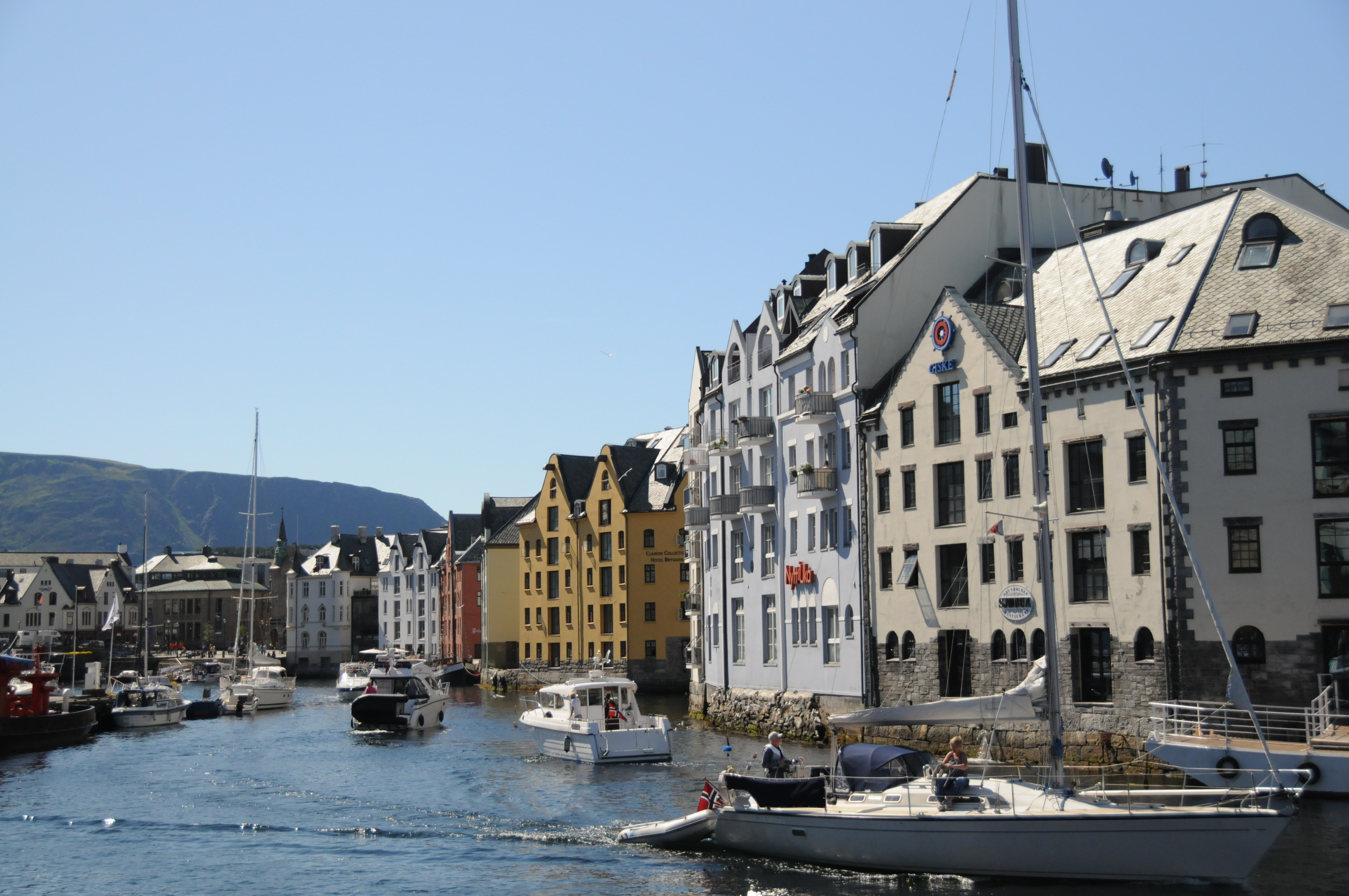 Ålesund